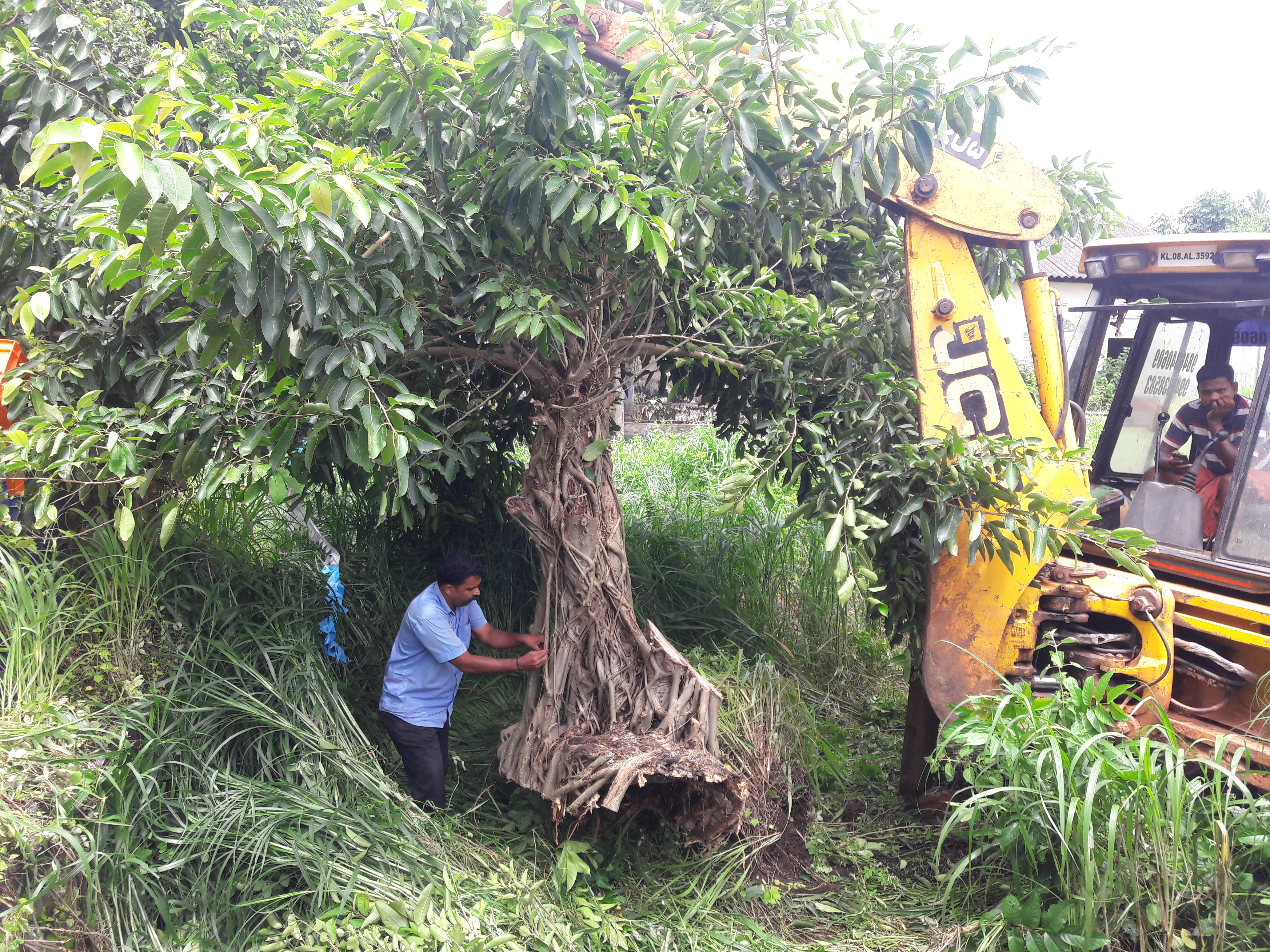 മലപ്പുറം ജില്ലയിലെ പൊന്നാനി താലൂക്കില്‍ വെളിയംകോട് സ്കൂള്‍ പടിയില്‍ പ്രവര്‍ത്തിക്കുന്ന പ്ലാന്‍റ് വില്ലേജ് ചാരിറ്റബിള്‍ സൊസൈറ്റി എന്ന നേച്ചര്‍ ക്ലബ് കൊയലി മരത്തെ പറിച്ചു നടല്‍ പ്രക്രിയ വഴി മറ്റൊരിടത്തേക്ക് മാറ്റുന്നു.Indian Bat tree, Indian Bat fig ശാസ്ത്രീയ നാമം Ficus amplissima കുടുംബം Moraceae.